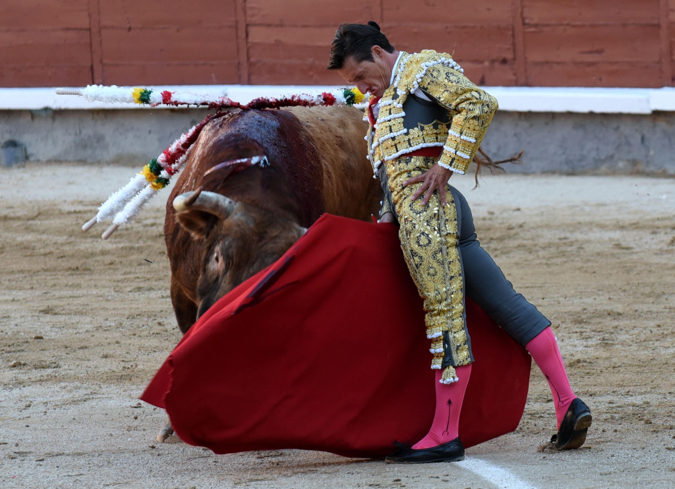 Cargando la suerte, Urdiales somete con un trincherazo a un toro que no humilla y alcanza a puntear la muleta.